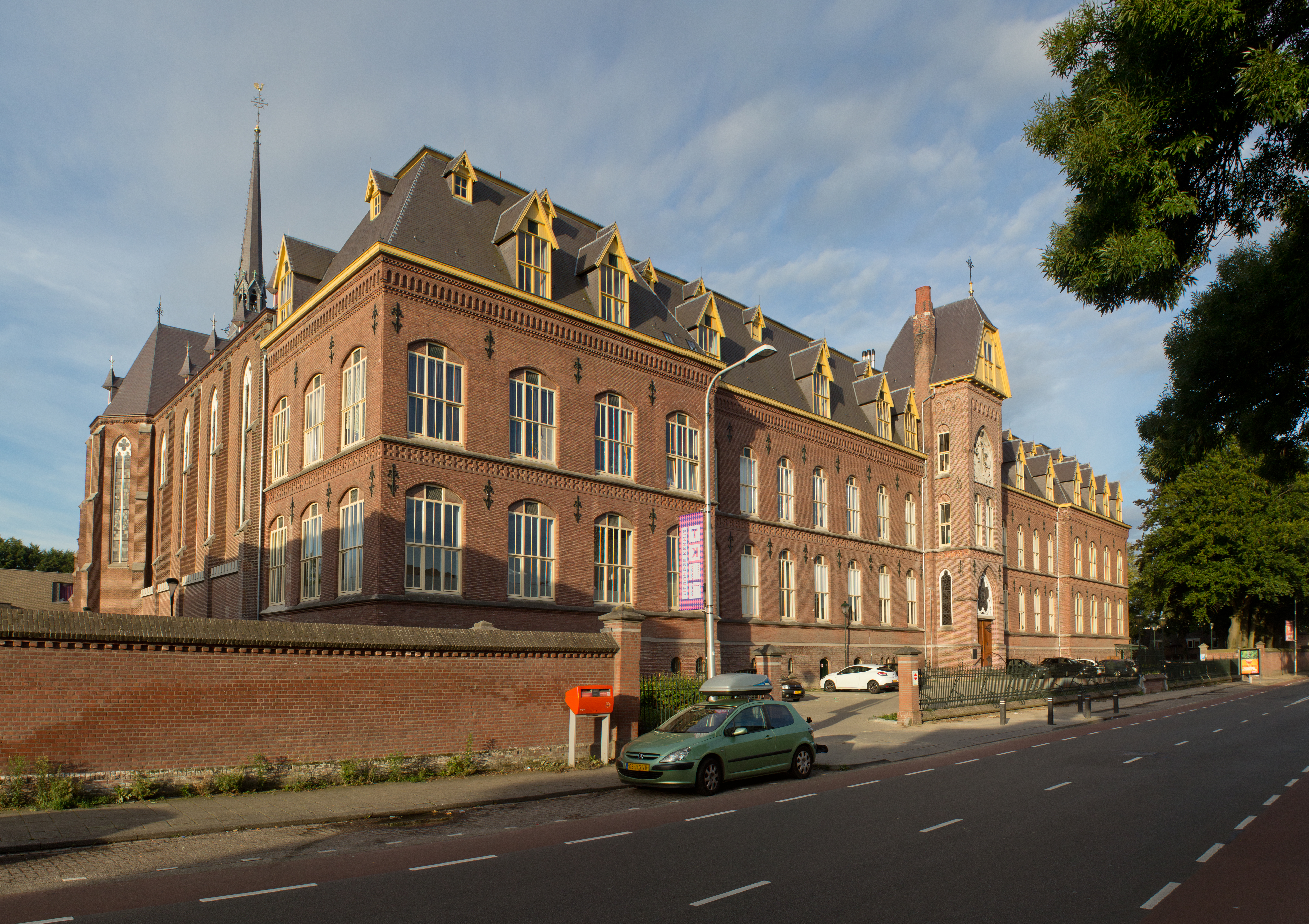 Het missiehuis van de Missionarissen van het Heilig Hart, aan Bredaseweg te Tilburg